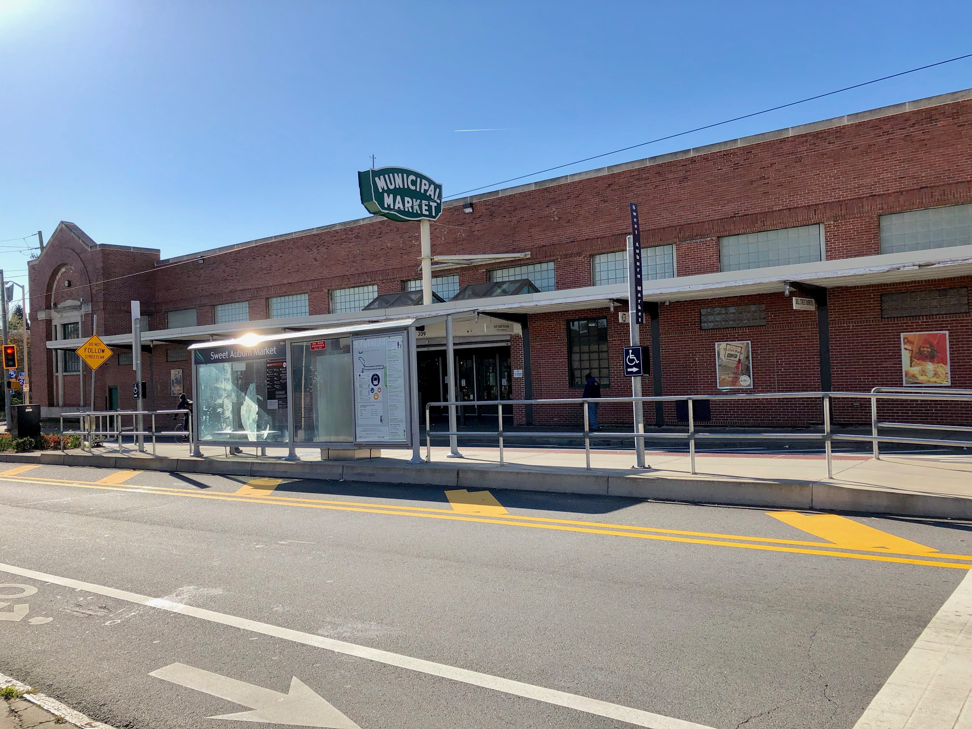 Atlanta Municipal Market, Atlanta, GA